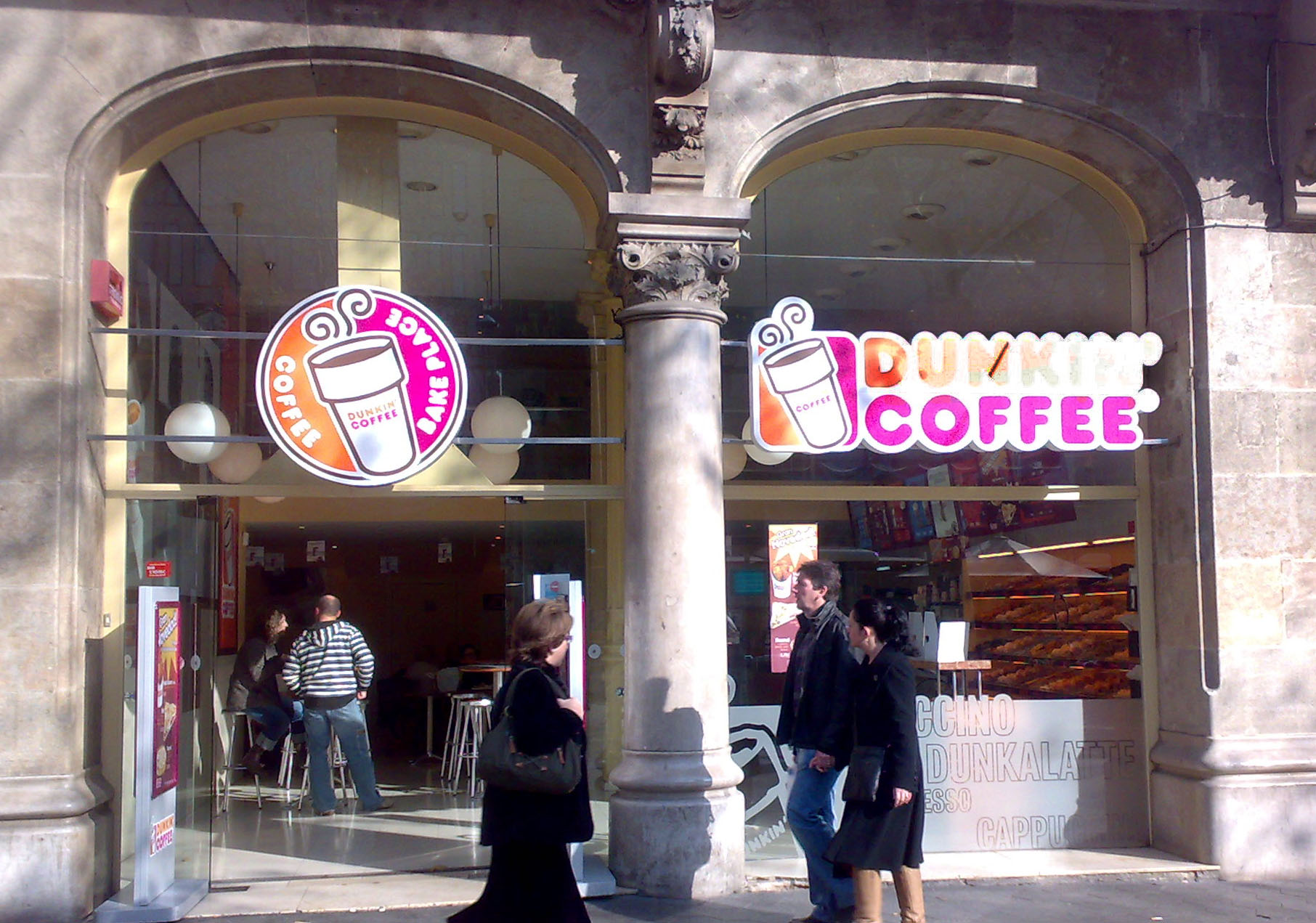 Cafetería Dunkin Coffee en Passeig de Gràcia (Barcelona)